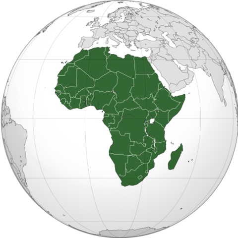 AFRica